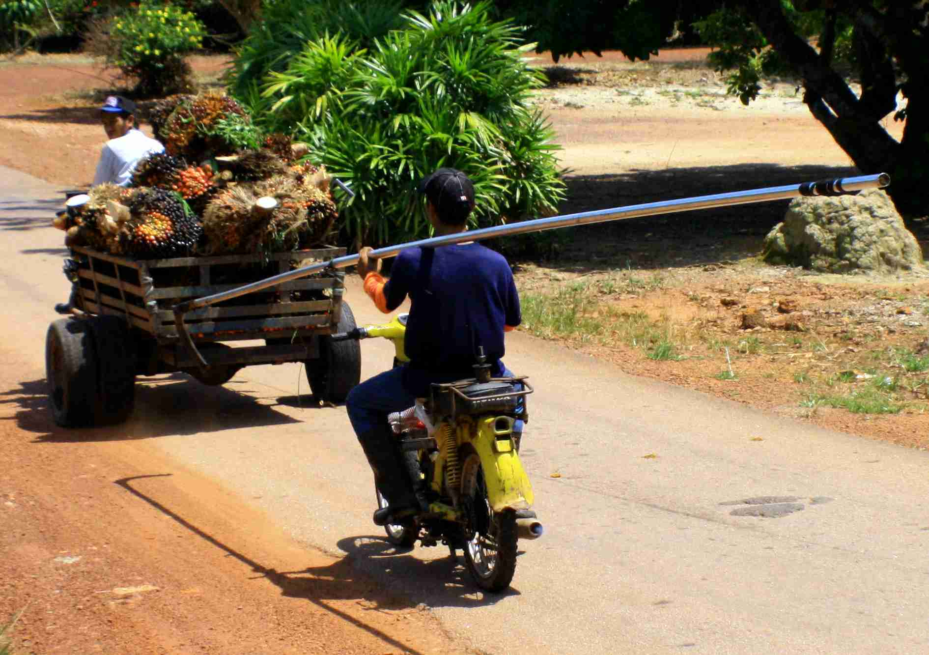 Ladang sawit di Gersik